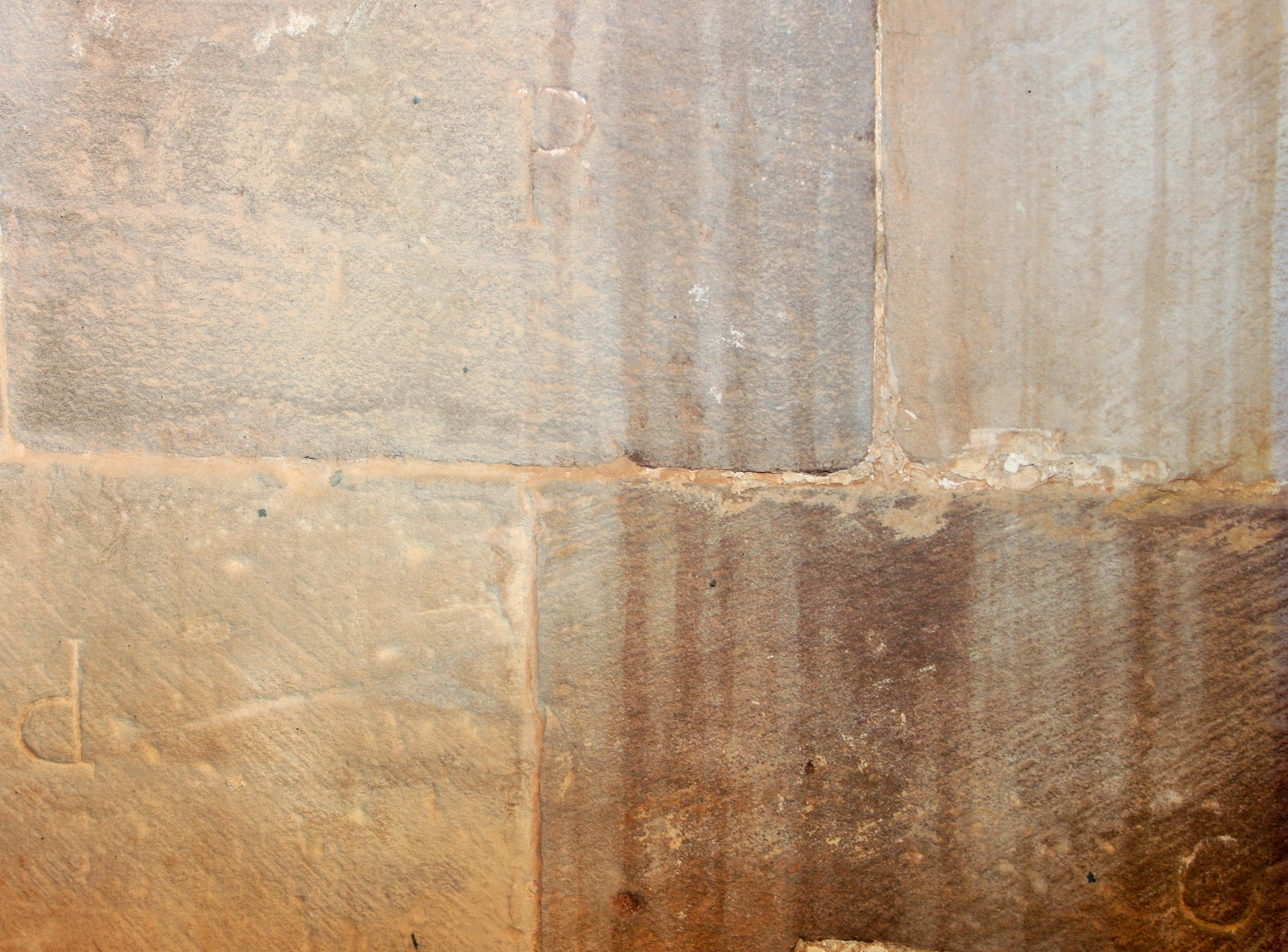 Santuario de Lugás. Villaviciosa. Asturias